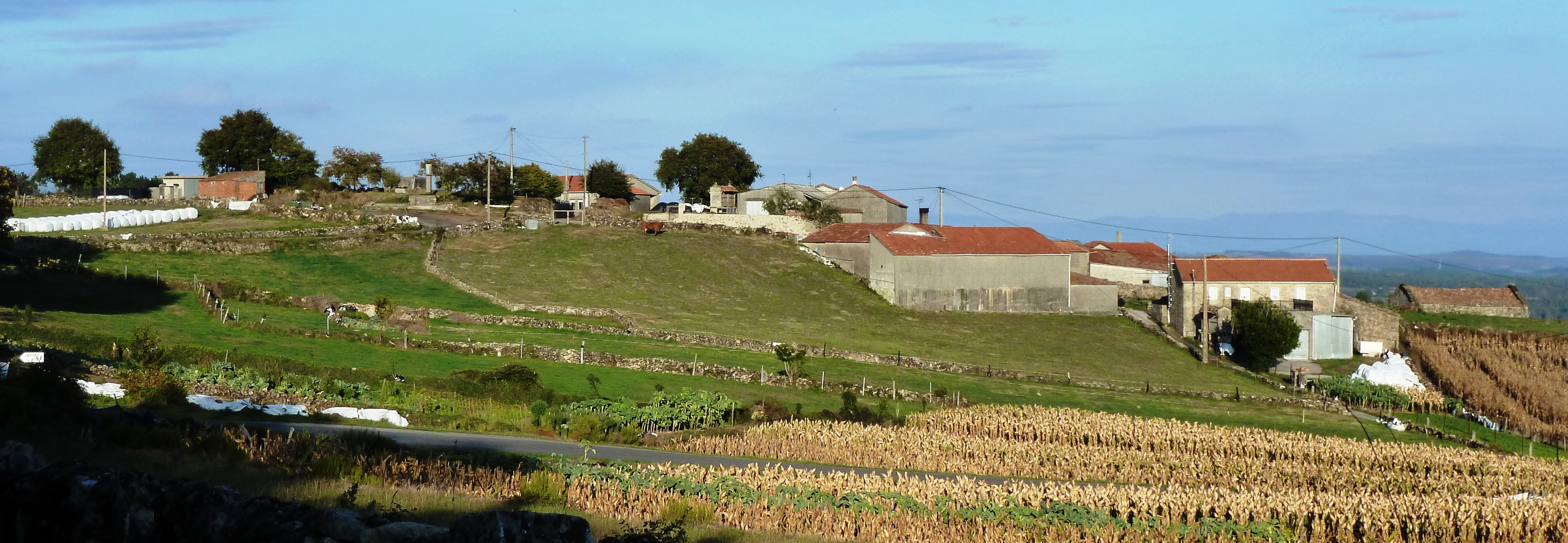 Vista xeral de Enxerto, Aguada, Carballedo